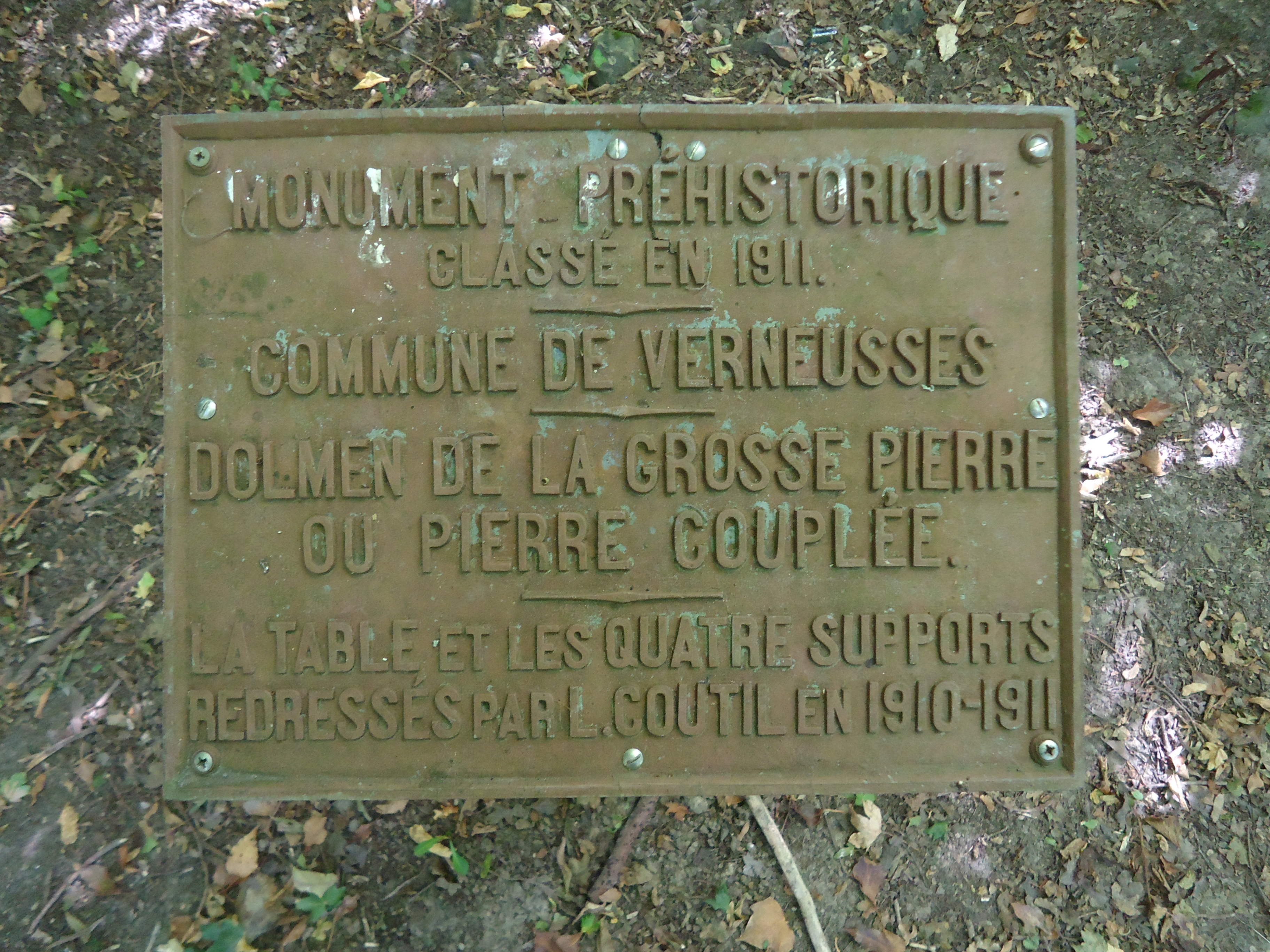 Plaque commémorative de l'opération de redressement du dolmen de la Grosse Pierre à Verneusses dans l'Eure